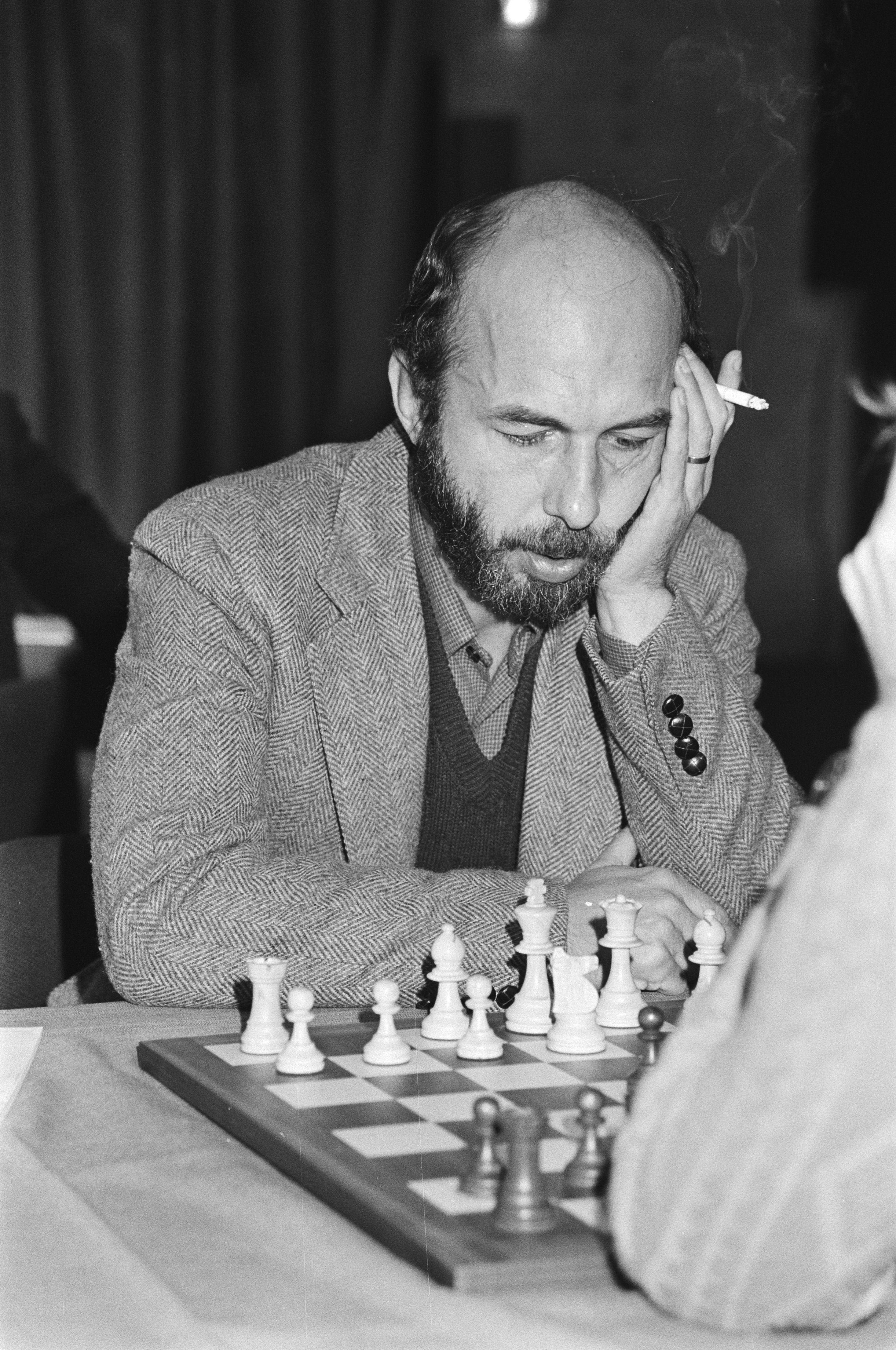 Collectie / Archief : Fotocollectie Anefo Reportage / Serie : [ onbekend ] Beschrijving : Eerste ronde Hoogovens Schaaktoernooi in Wijk aan Zee . 14a Van der Wiel in aktie, 15a Kavalek in aktie, 16a Genna Sosonko in aktie Datum : 15 januari 1982 Locatie : Noord-Holland, Wijk aan Zee Trefwoorden : schaken, toernooien Persoonsnaam : Genna Sosonko, Kavalek Fotograaf : Dijk, Hans van / Anefo Auteursrechthebbende : Nationaal Archief Materiaalsoort : Negatief (zwart/wit) Nummer archiefinventaris : bekijk toegang 2.24.01.05 Bestanddeelnummer : 931-9138